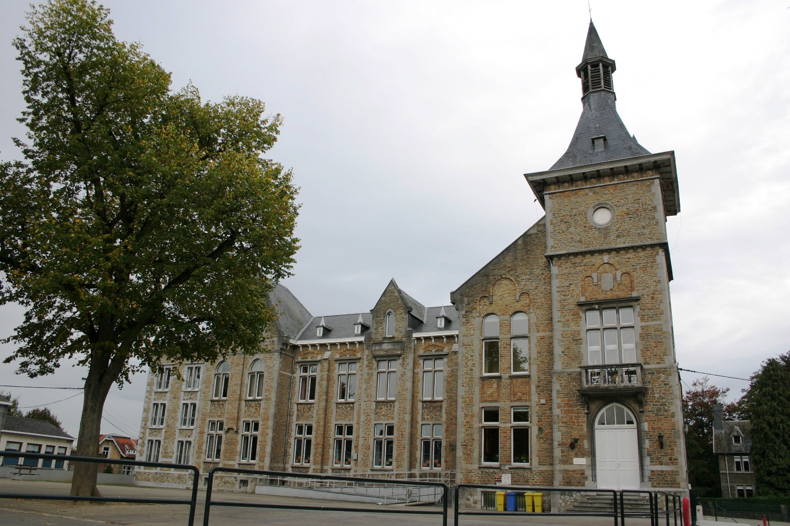 D'Schoul vu Sprimont.